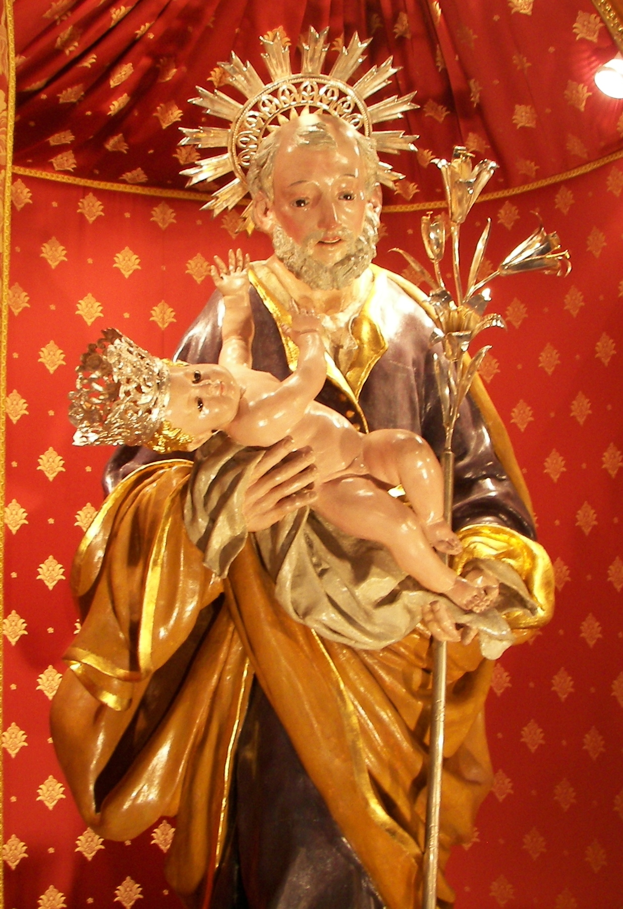 Simulacro ligneo di San Giuseppe, patrono dei Liocodiesi, venerato nella Chiesa Madre di Santa Maria di Licodia.